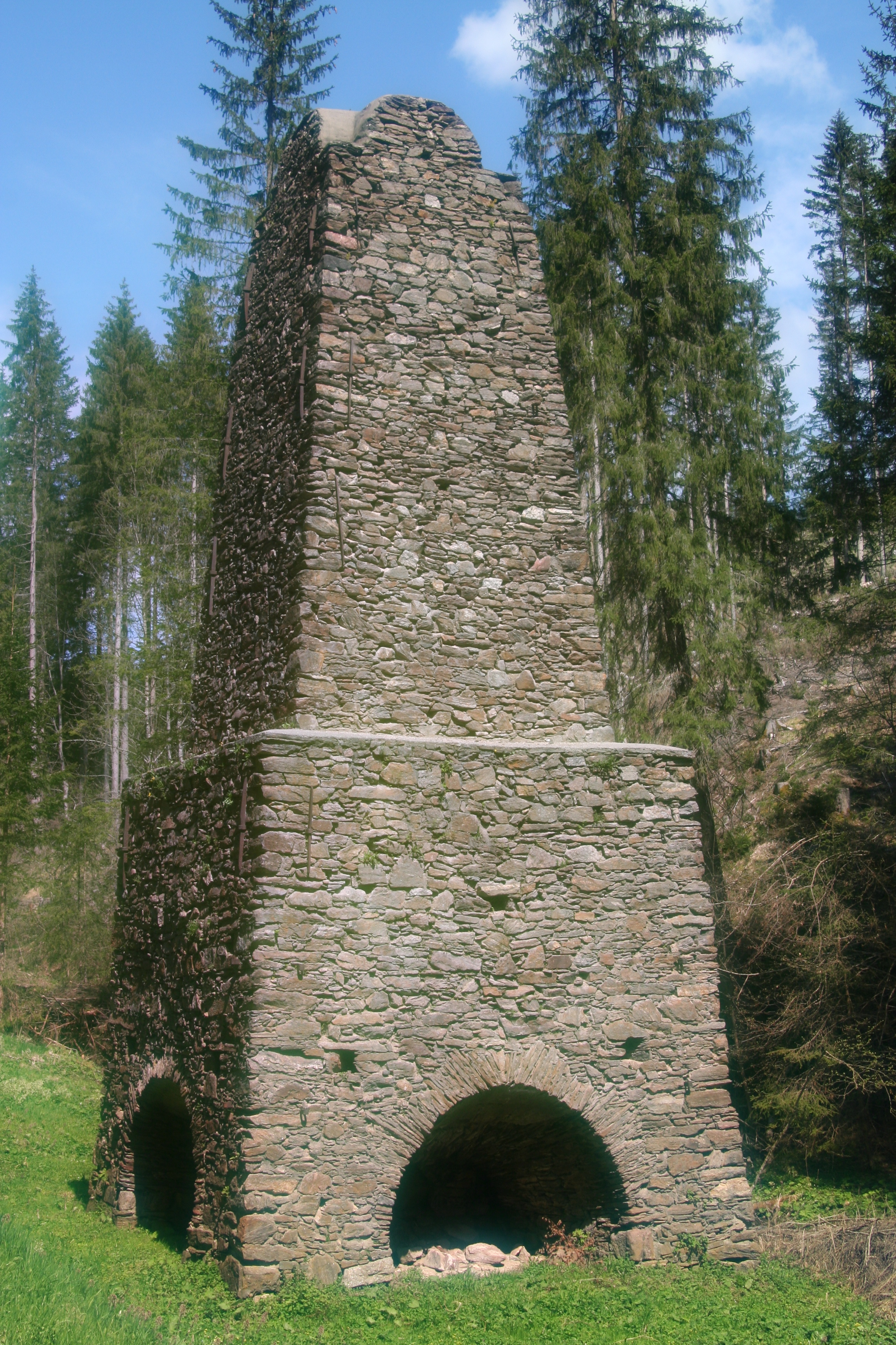 Fuchsfloßofen im Heftergraben